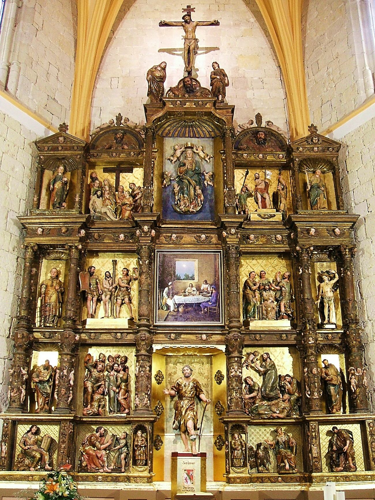 Retablo Mayor plateresco (siglo XVI) de la Iglesia de San Lázaro, Palencia, España/Spain